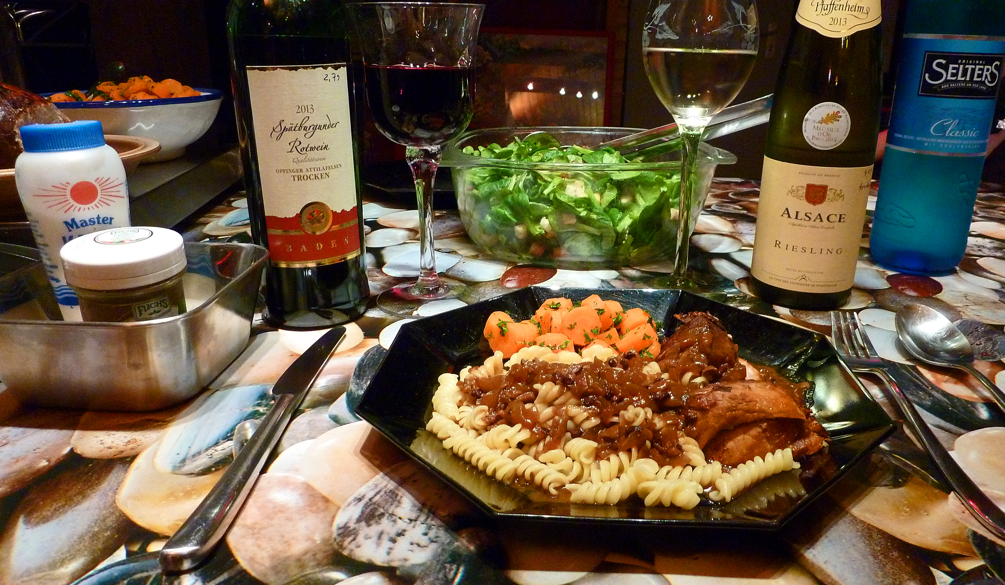 Schweinebraten mit Wellennudeln, Karottengemüse und Feldsalat. Dazu ein trockener roter Spätburgunder und ein trockener Elsäßer Riesling. - engl.: Roast Pork, 'Wave-Pasta' (our name for 'fusilli'), Carrot vegetable and lamb's lettuce. Also a dry German red wine and a dry French Riesling}. - Our recipe (in German) you can find here